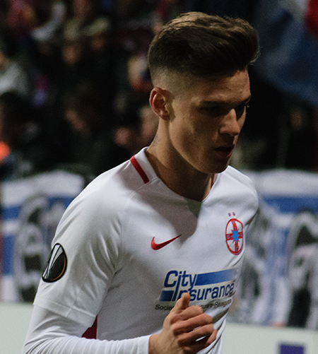 Dennis Man